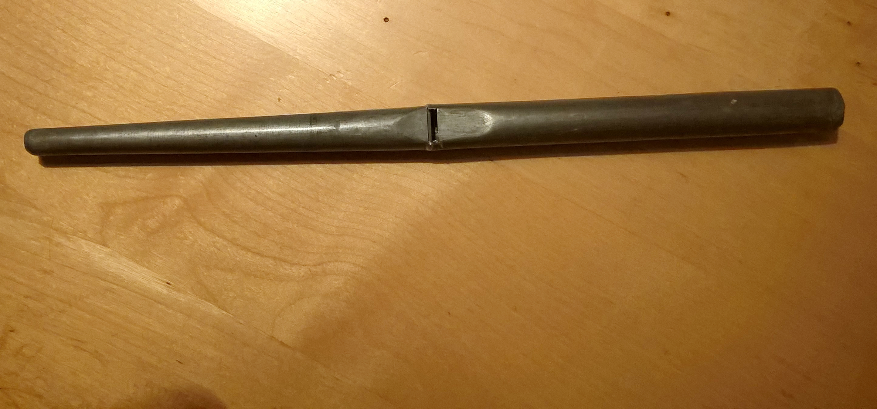 Mixtur-Pfeife der Heinemann-Orgel in der Evangelischen Kirche Breidenbach, Landkreis Marburg-Biedenkopf, Hessen, Deutschland